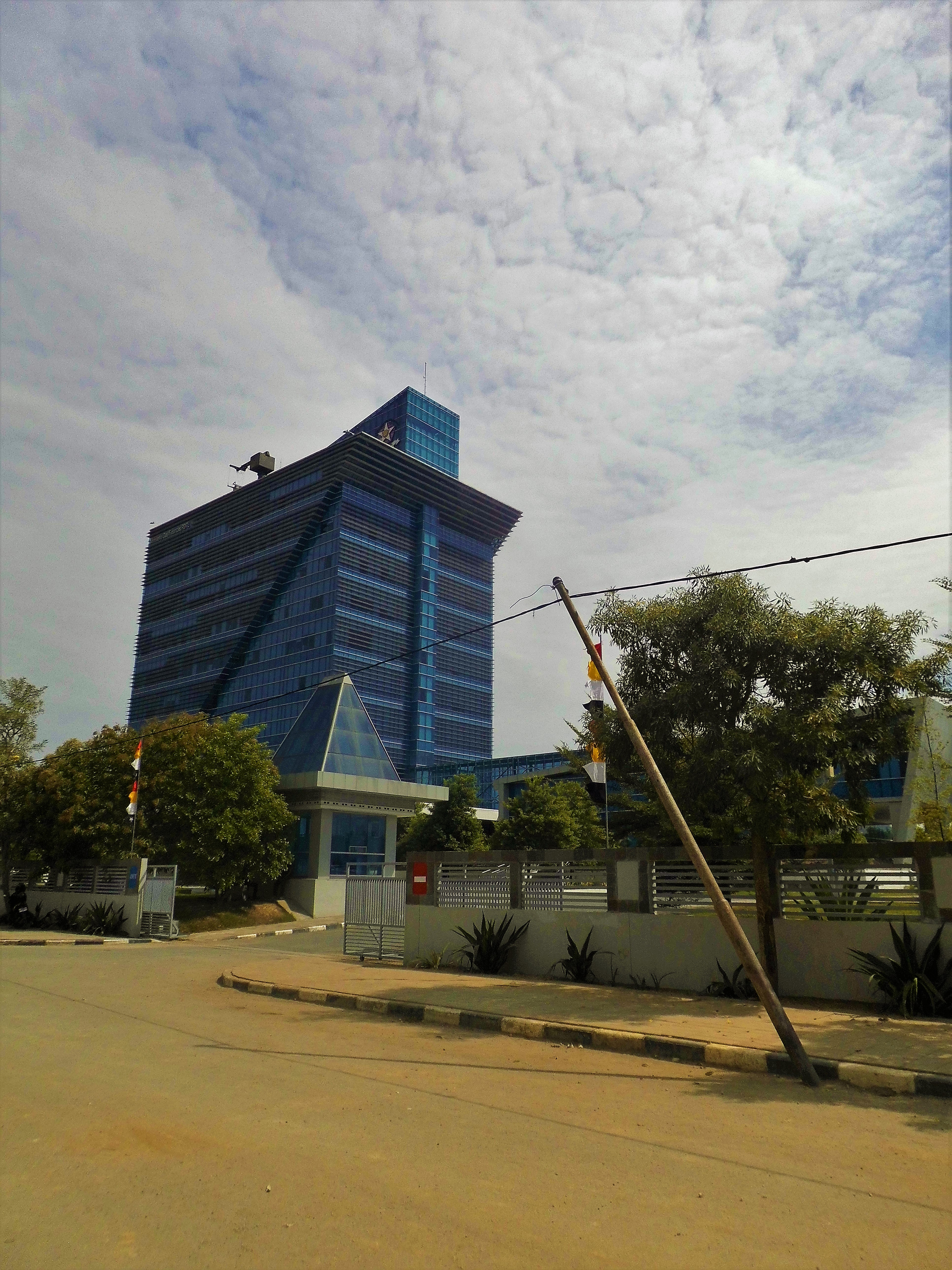 Finanzministerium, Dili, Osttimor